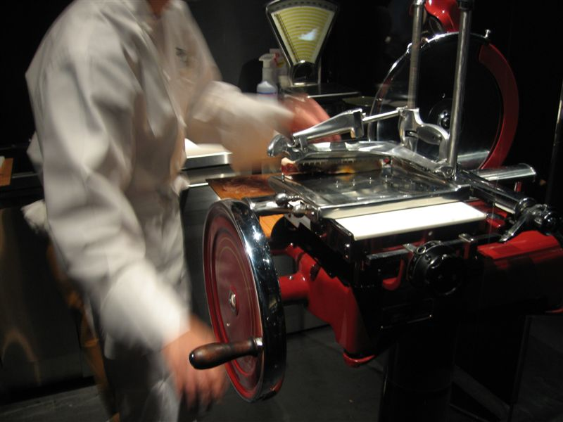 Slicer slicing prosciutto